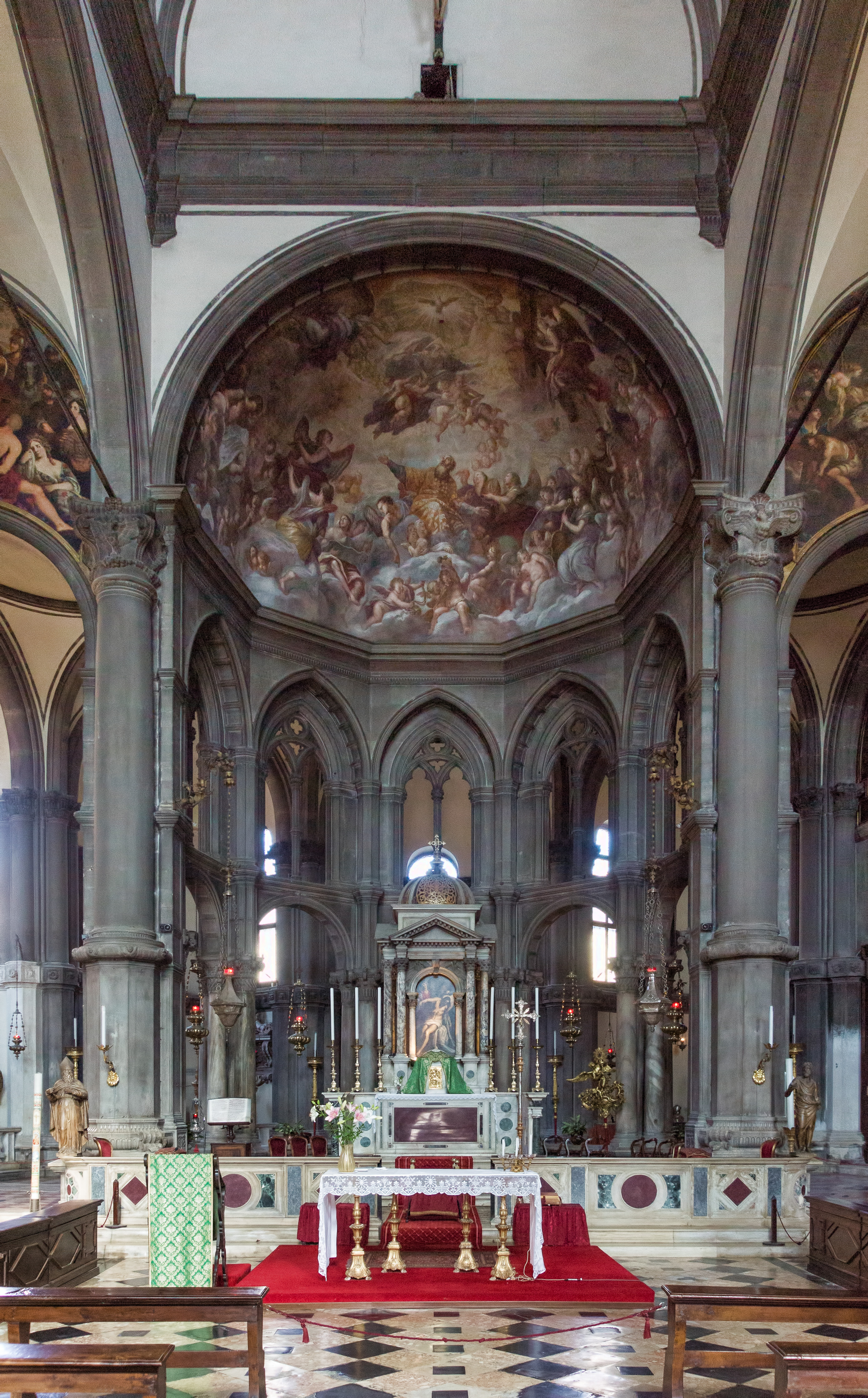 Venise - San Zaccaria - Choeur